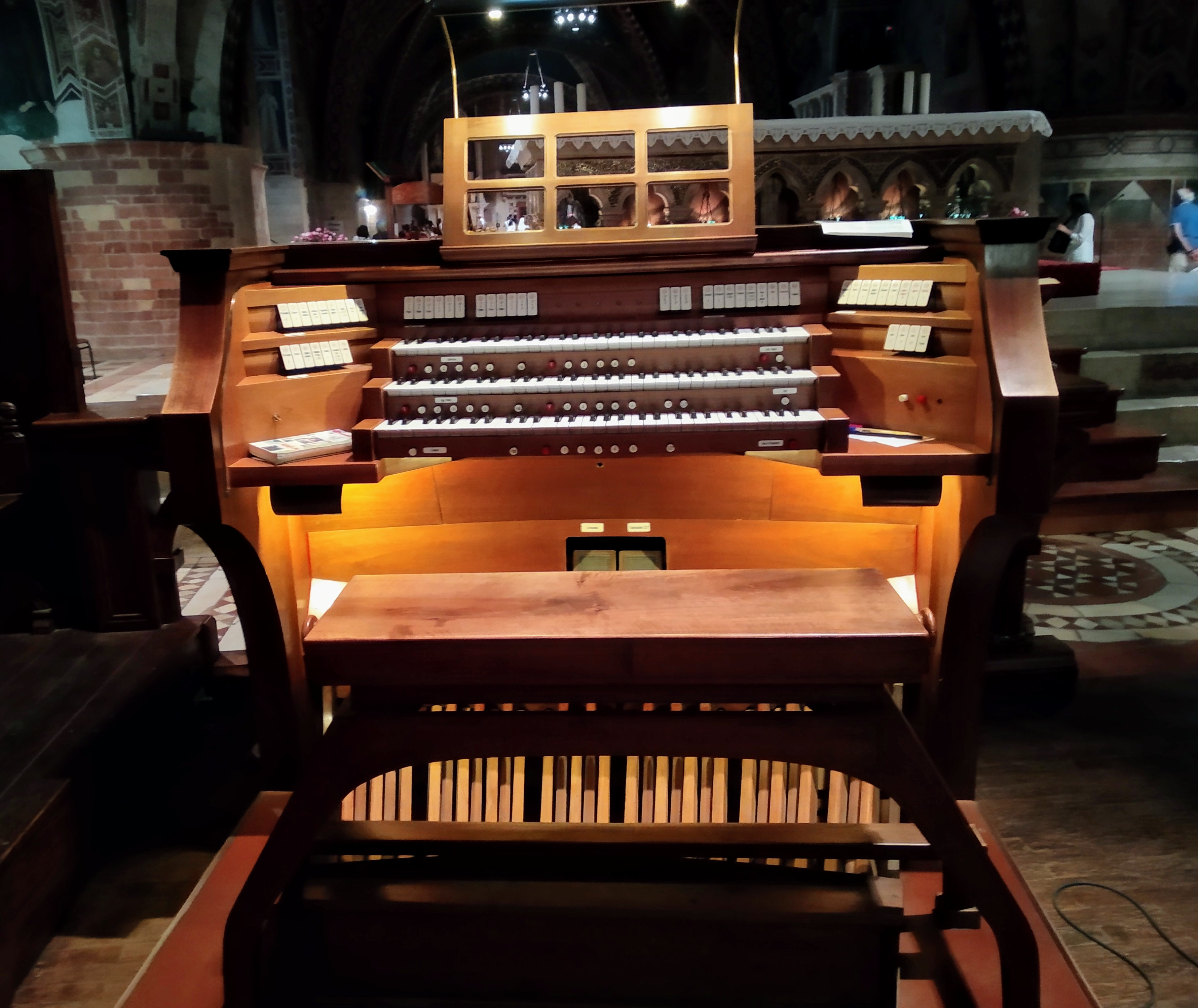 Organo Mascioni (collocato dietro al coro)